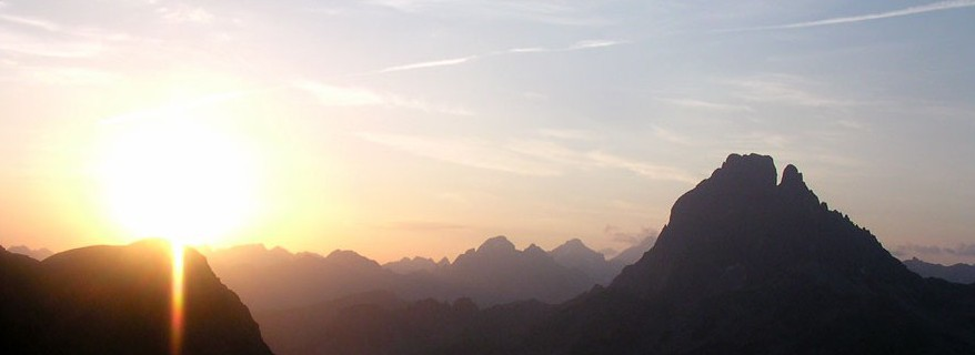 Lever de soleil derrière le Jean Pierre Auteur: chris2so